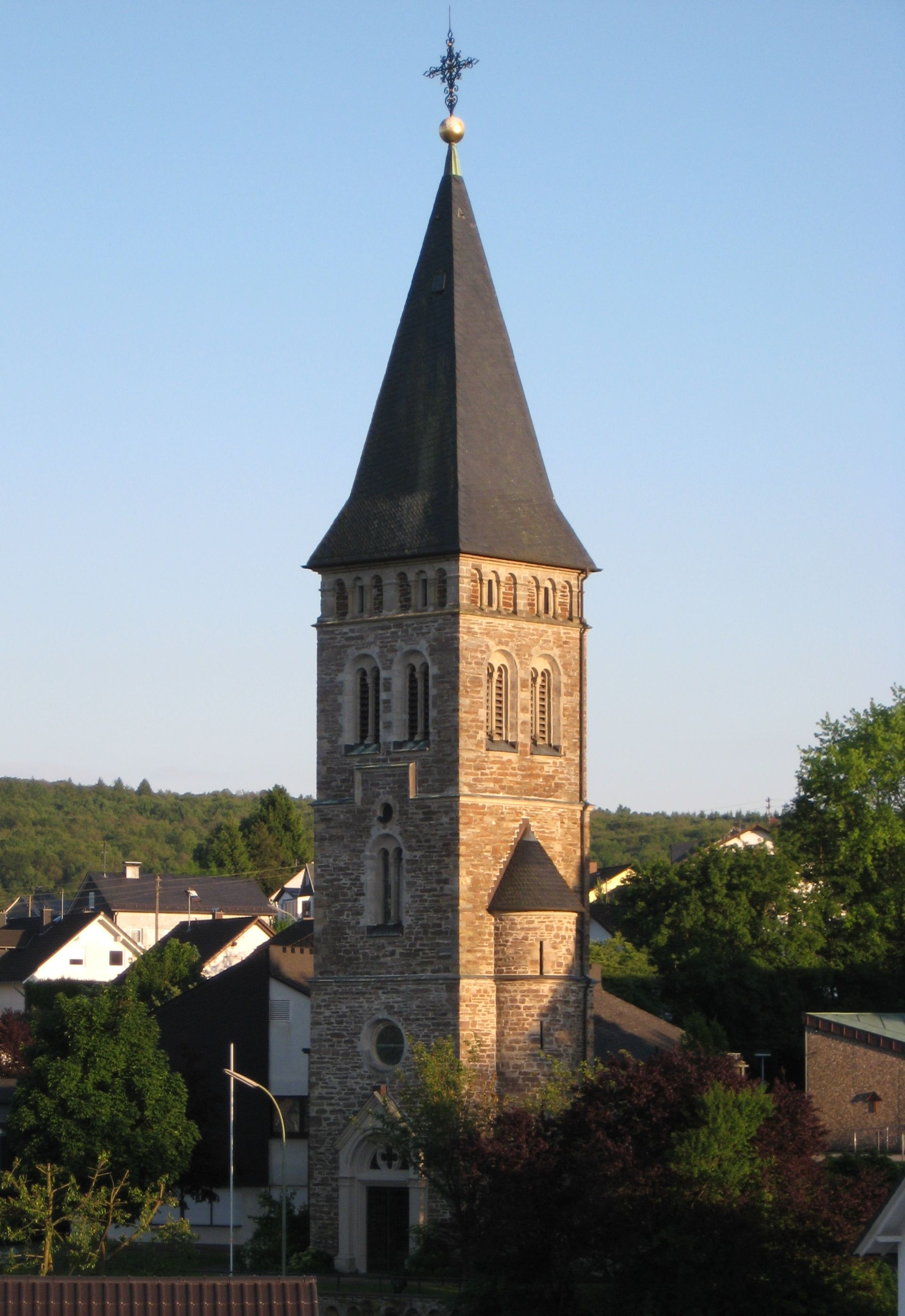 Der Glockenturm der katholischen Kirche (St. Martinus) in Wilnsdorf, Kreis Siegen-Wittgenstein.